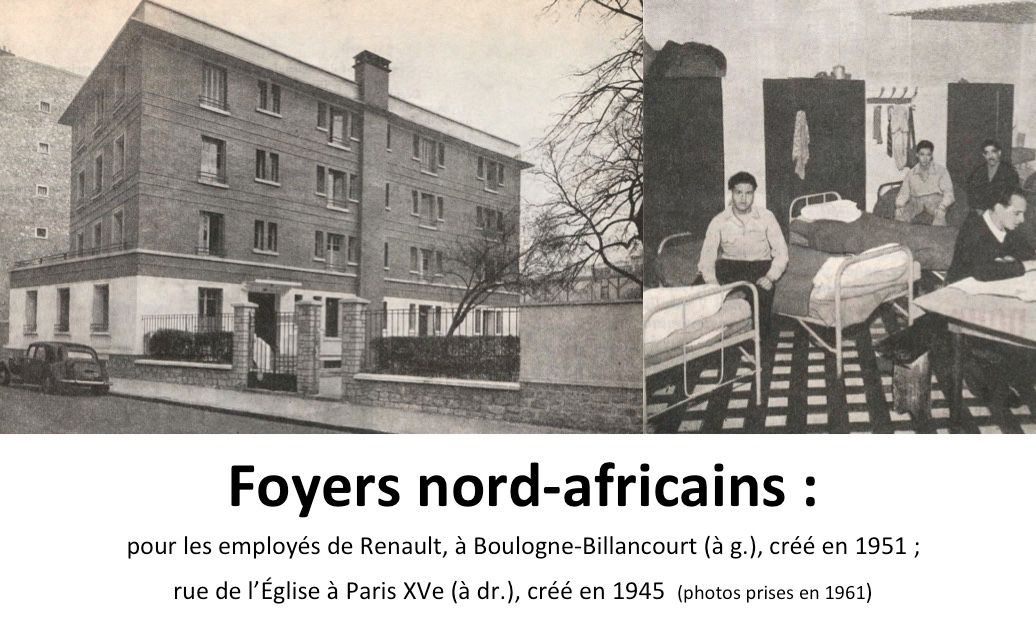 Travail corrigé (il manquait un "s" à "foyer" sur l'image précédente) Images utilisées : Foyer nord-africain de la Régie Renault, Boulogne-Billancourt, 1961.jpg Foyer nord-africain, rue de l'Église, Paris XVe, 1961.jpg Domaine public